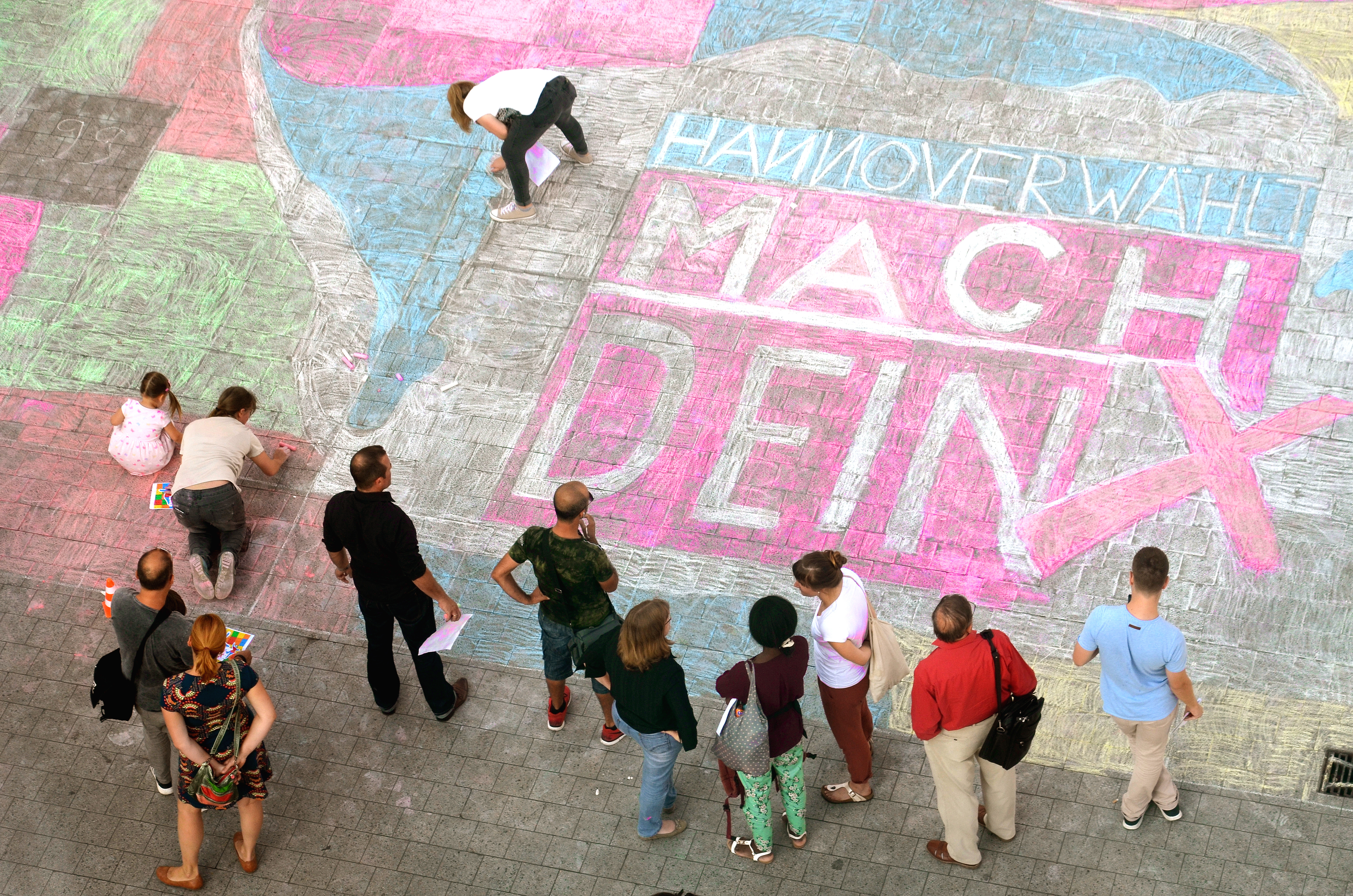 Als Aufforderung zur Teilnahme an den Kommunalwahlen in Niedersachsen 2016 am 11. September 2016 hatte der Freundeskreis Hannover am Freitag vor dem Wahltag Passanten am Kröpcke zum gemeinsamen Mitmalen an einem 160 Quadratmeter großen bunten Kreidebild eingeladen, mit dem zugleich zur Teilnahme an den Wahlen aufgefordert wurde unter dem Motto „Hannover wählt: Mach' Dein Kreuz!“ ...